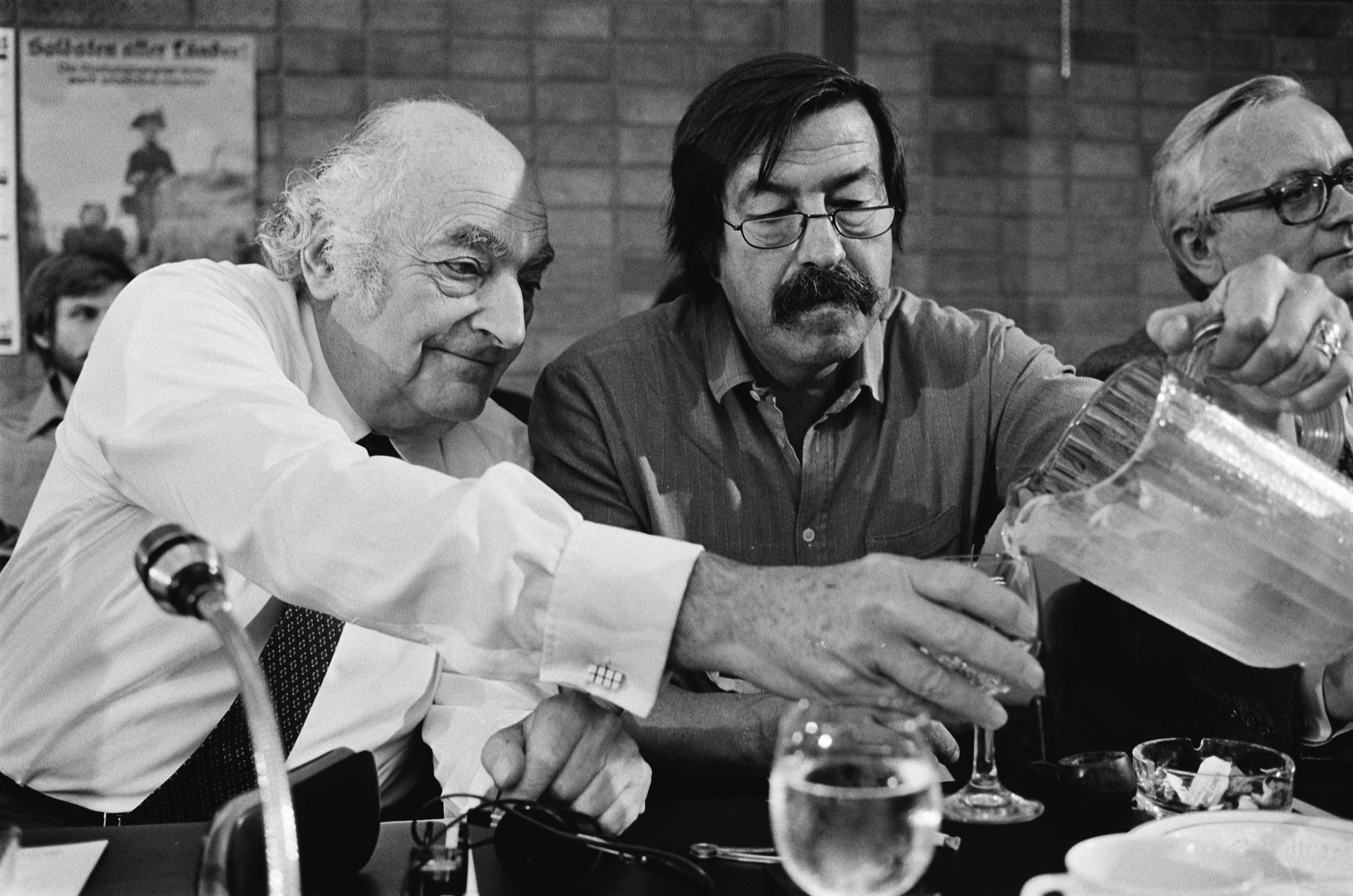 Collectie / Archief : Fotocollectie Anefo Reportage / Serie : [ onbekend ] Beschrijving : Europese conferentie van schrijvers "Haagse Treffen" in Kurhaus te Scheveningen; Stefan Heym (DDR) (l) en Gunter Grass (BRD) schenkt water in Datum : 25 mei 1982 Locatie : D.D.R., Duitsland, Scheveningen Trefwoorden : SCHRIJVERS, conferenties Fotograaf : Antonisse, Marcel / Anefo Auteursrechthebbende : Nationaal Archief Materiaalsoort : Negatief (zwart/wit) Nummer archiefinventaris : bekijk toegang 2.24.01.05 Bestanddeelnummer : 932-1797